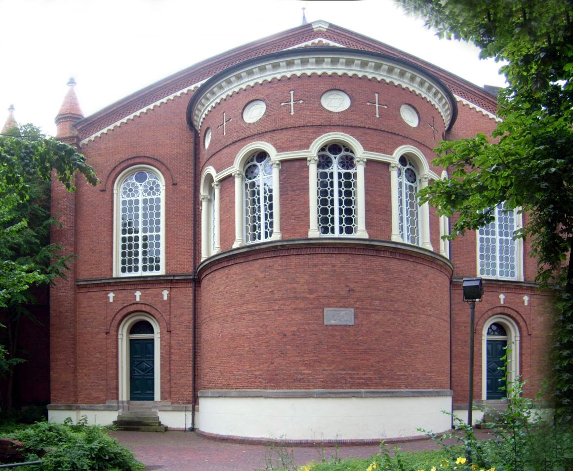 Evangelische Kirche in Esens Backsteingotik